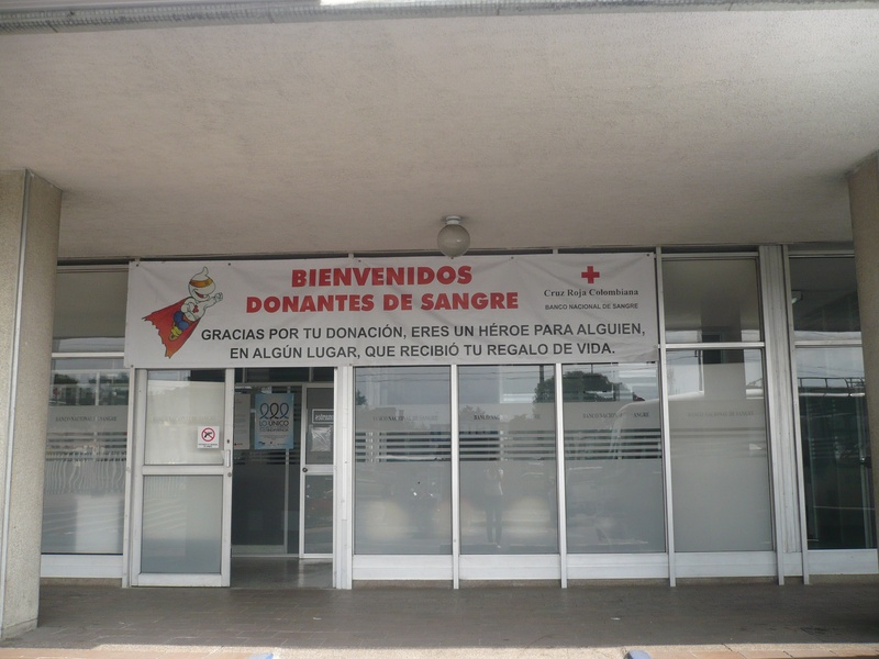 Foto de la entrada del banco de sangre ubicado en la sede principal de La Cruz Roja Colombiana. Av 68.